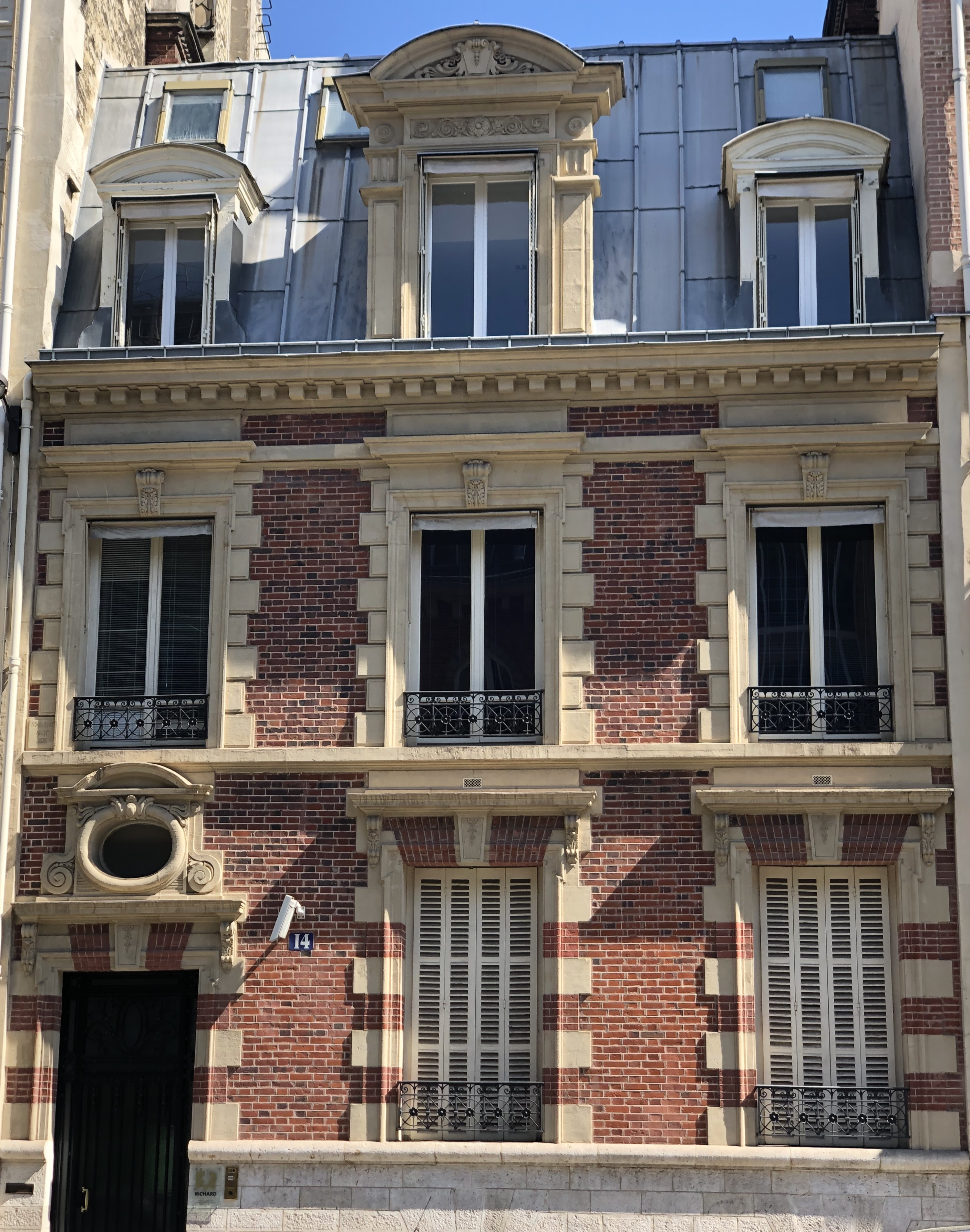 Hôtel particulier XIXème siècle, façade de style Louis XII - Plaine Monceau (rue Alphonse de Neuville)